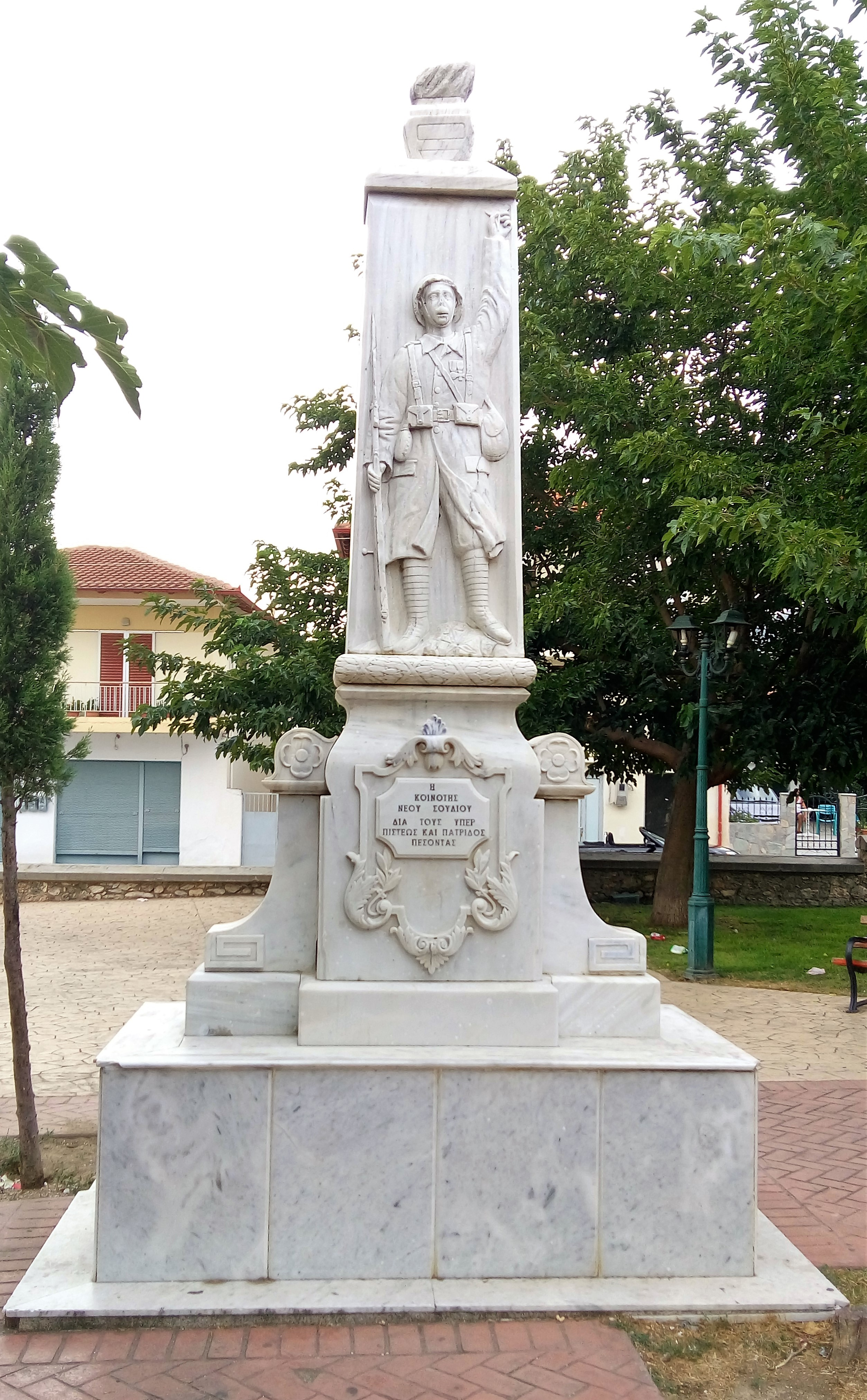 Μνημείο για τους πεσόντες κατοίκους του Νέου Σουλίου κατά τους εθνικούς αγώνες. Βρίσκεται στο πάρκο του Ναού του Αγίου Δημητρίου στην κεντρική πλατεία του χωριού.